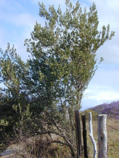 Olea europaea ssp. europaea (auf Maui)